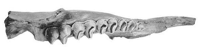 Euryzygoma fossil mandible